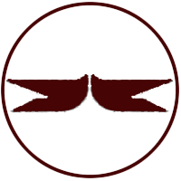 北大阪急行電鉄のロゴ